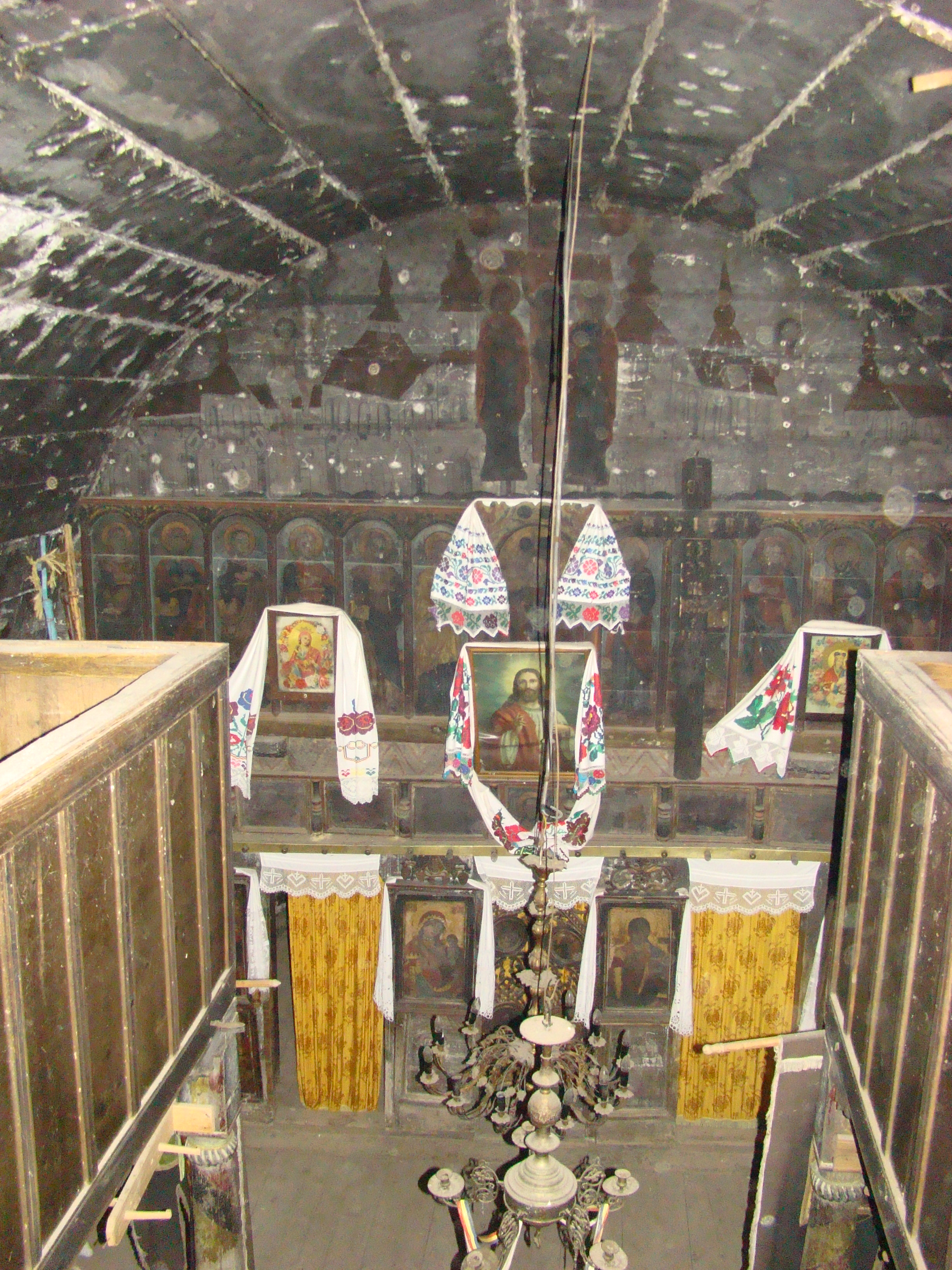 Biserica de lemn „Sfinții Arhangheli Mihail şi Gavriil" din Chieșd, județul Sălaj